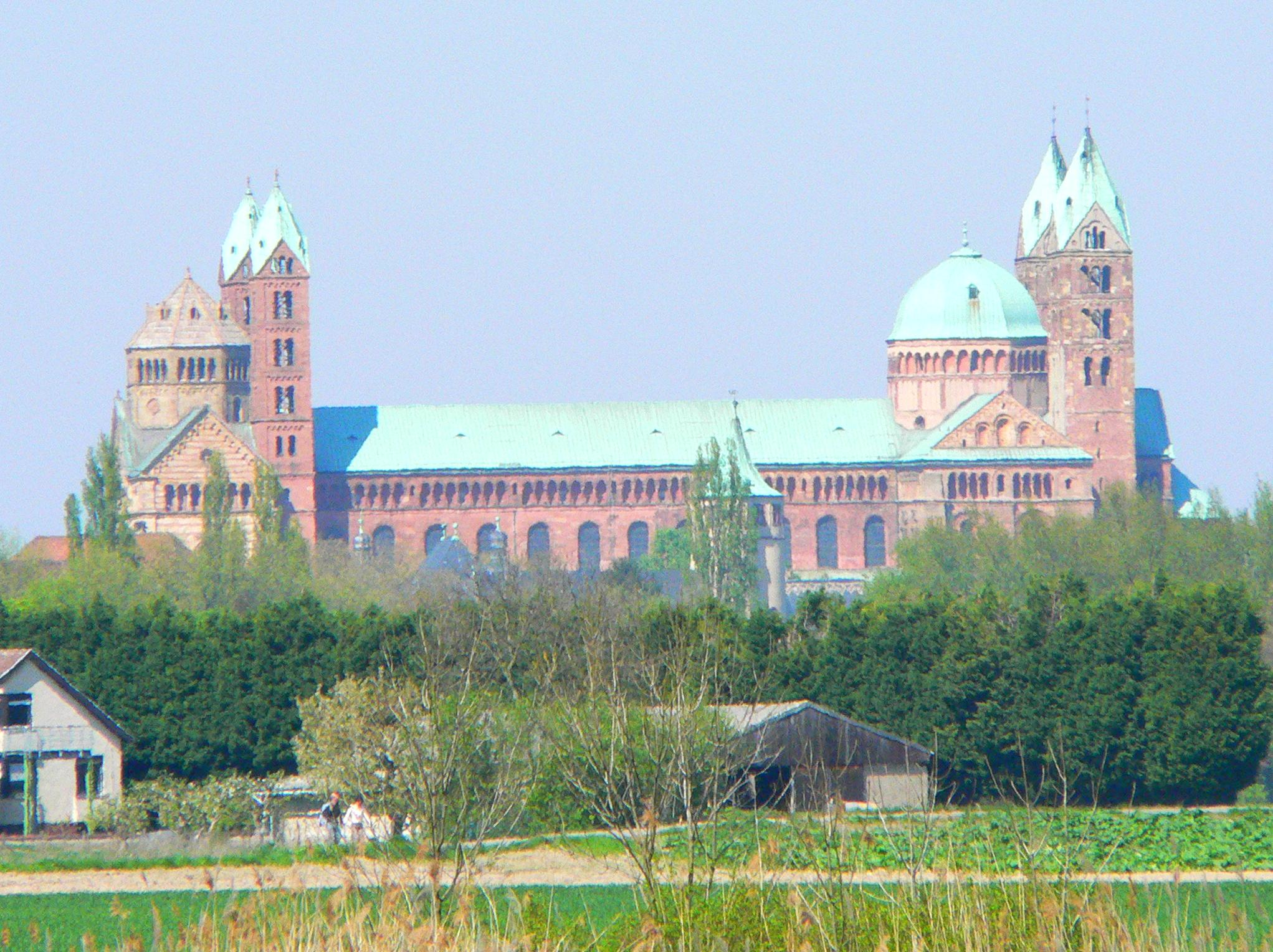 Speyerer Dom von der Altrhein-Schleife bei Berghausen (Pfalz) aus gesehen